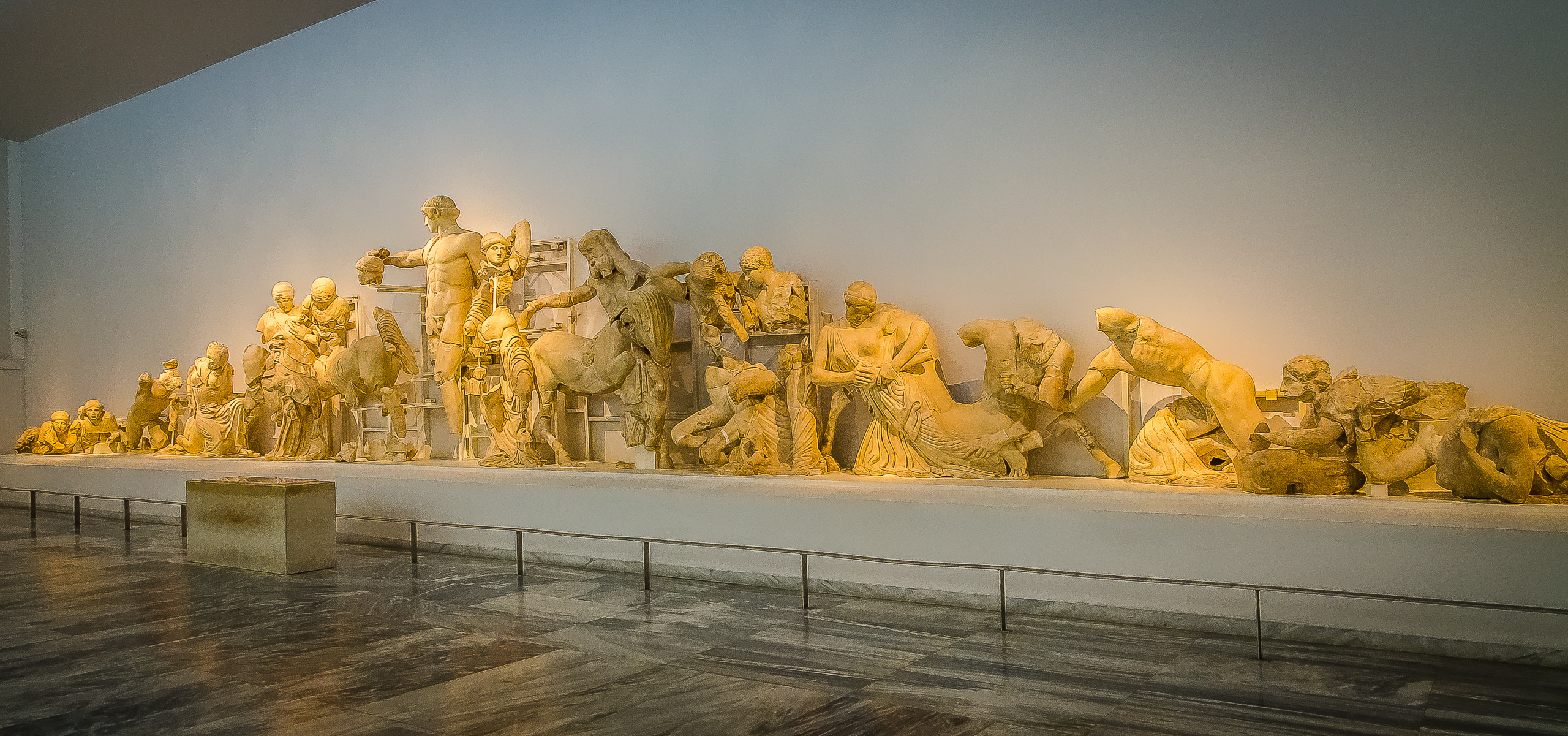 Frontón occidental del Templo de Zeus. Alrededor del 460 a.C.